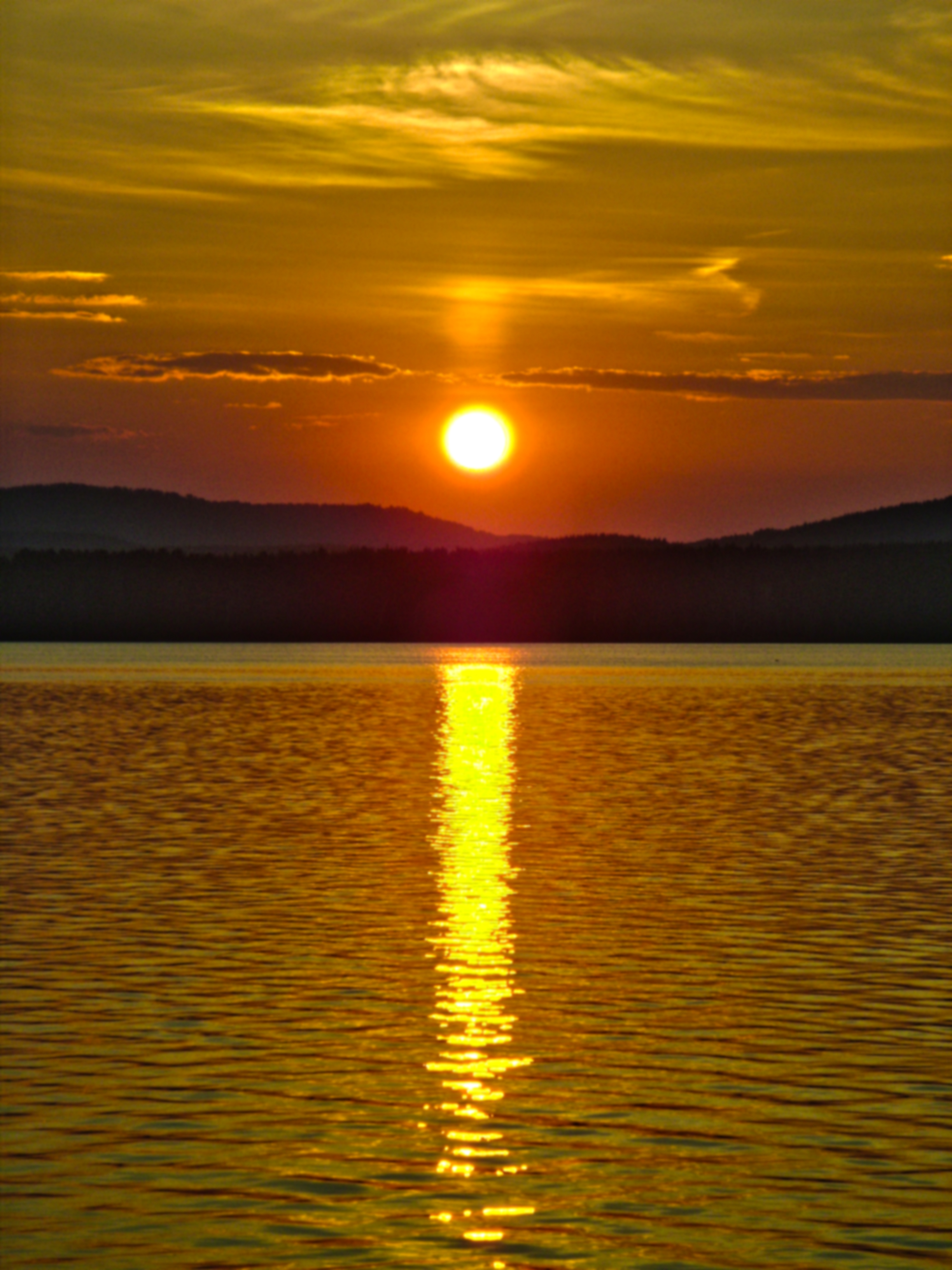 Озеро Большой Еланчик, Чебаркульский район This image is related to the protected area of Russia number 7410301